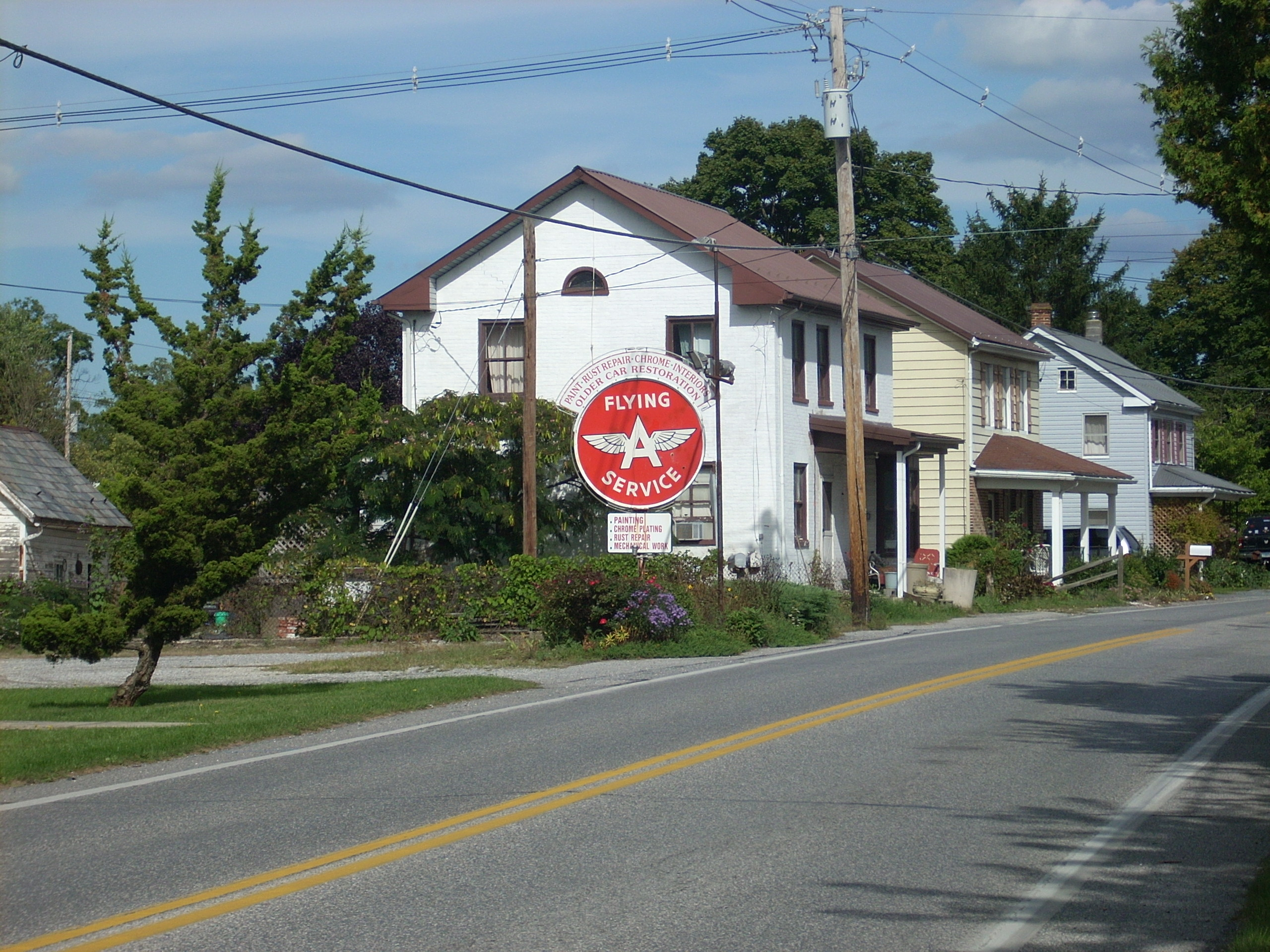 Mont Alto, Pennsylvania